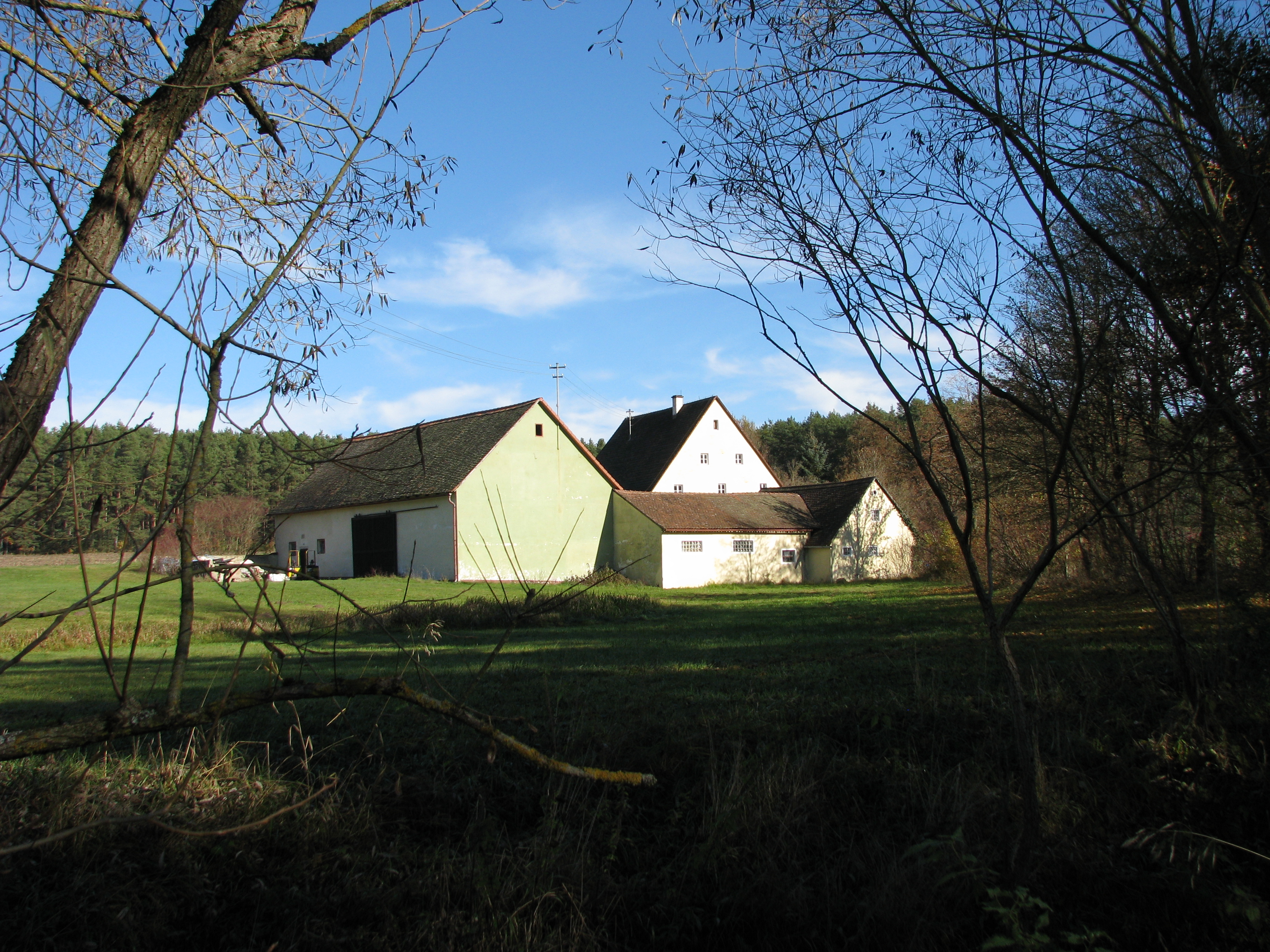 Seitzenmühle, OT von Hilpoltstein im mittelfränkischen Landkreis Roth (Bayern)